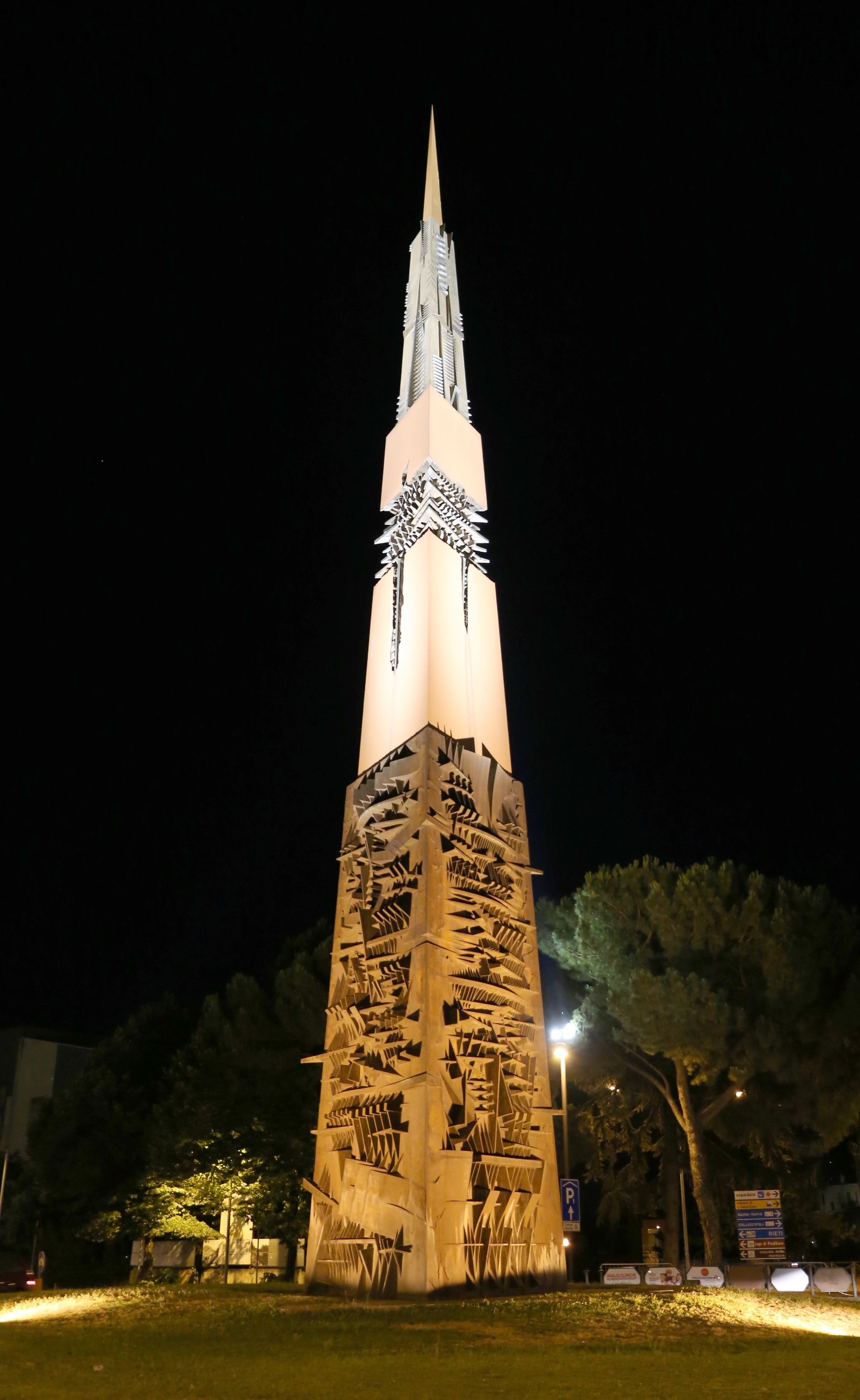 "Lancia di Luce" di Arnaldo Pomodoro This is a photo of a monument which is part of cultural heritage of Italy.